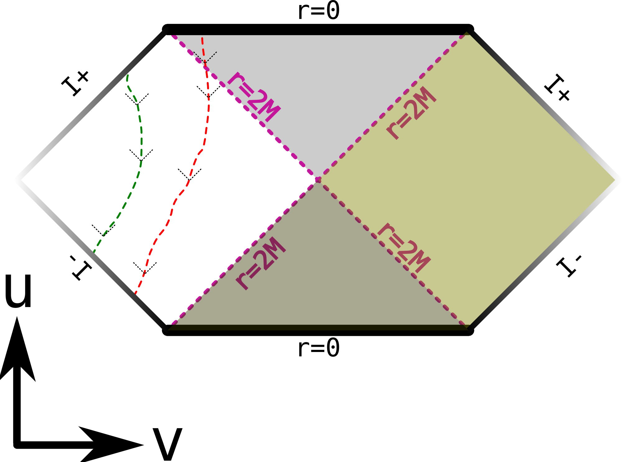 Exemple d'un « diamant » de Penrose. Diagramme d'une représentation bidimensionnelle de la métrique de Schwarzschild créée par un trou noir statique. Fichier PNG généré à partir d'un original vectoriel, logiciel Inkscape. Dessin personnel, source SVG disponible sur demande.